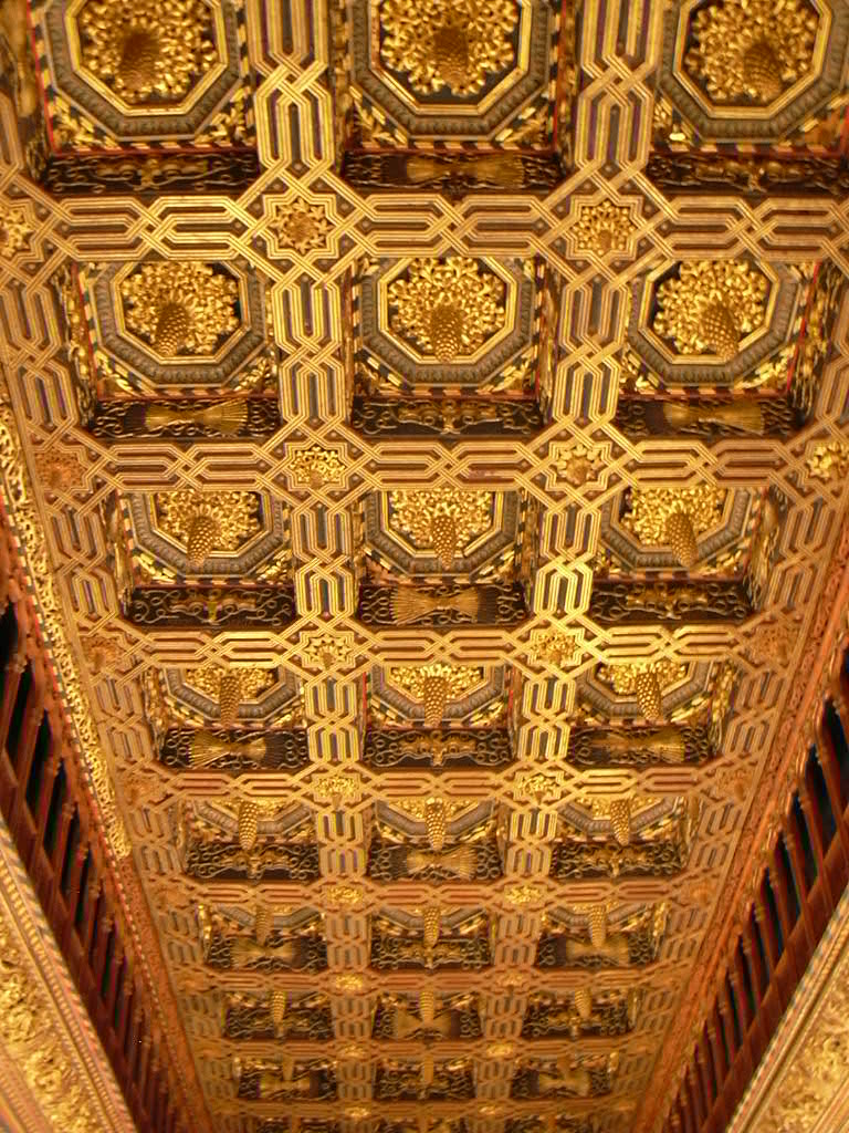 La Aljafería - Sala del trono - Techumbre. Artesonado en La Aljafería de Zaragoza